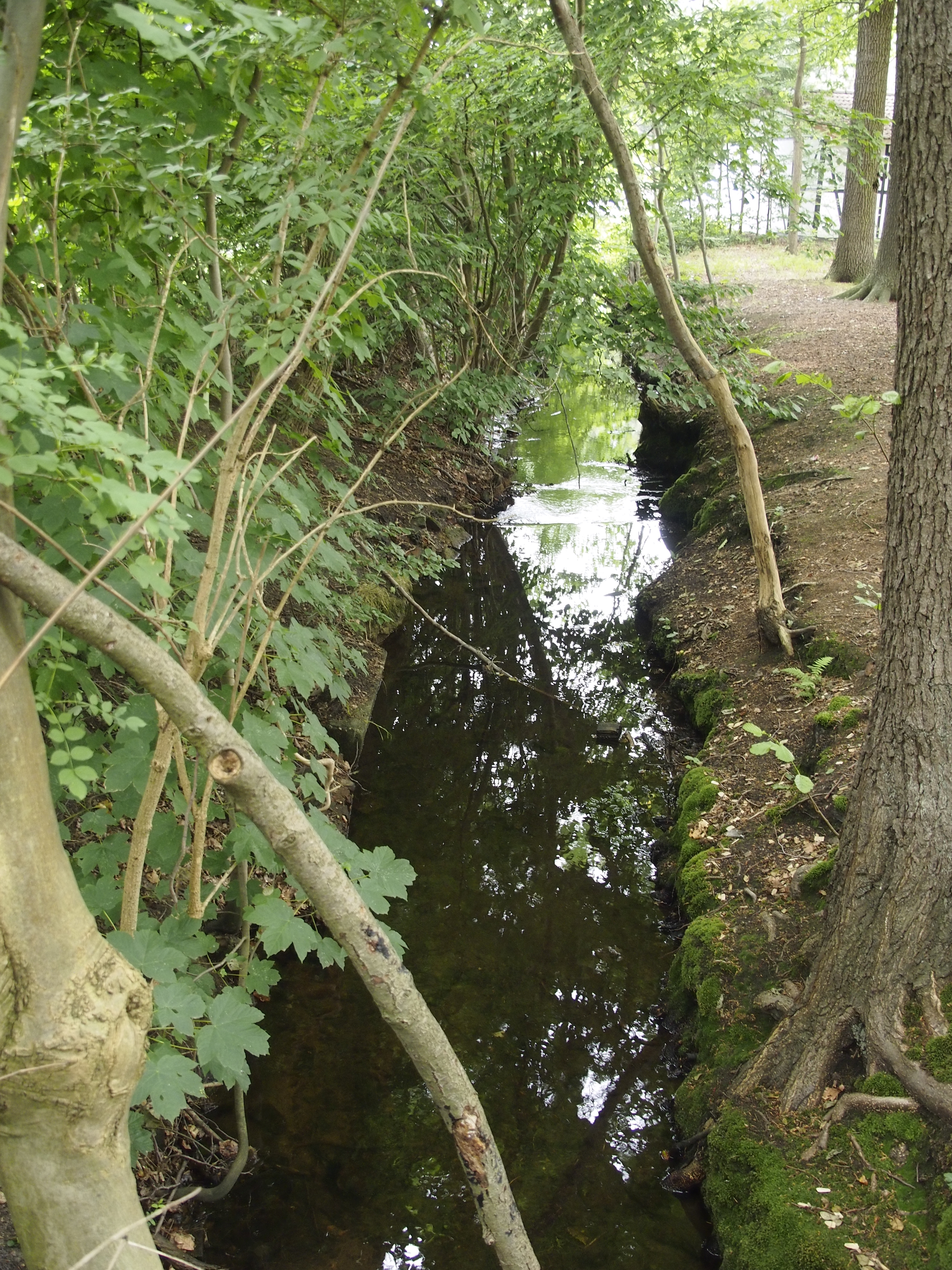 Mühlengraben in Sülze nahe der Salinen-Ausstellung (Salinenmodell)